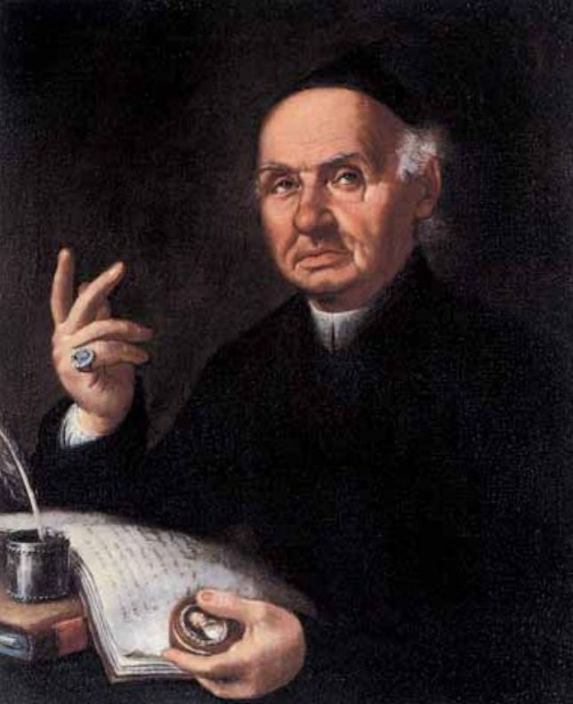 L'abate e poeta Bartolomeo Lorenzi